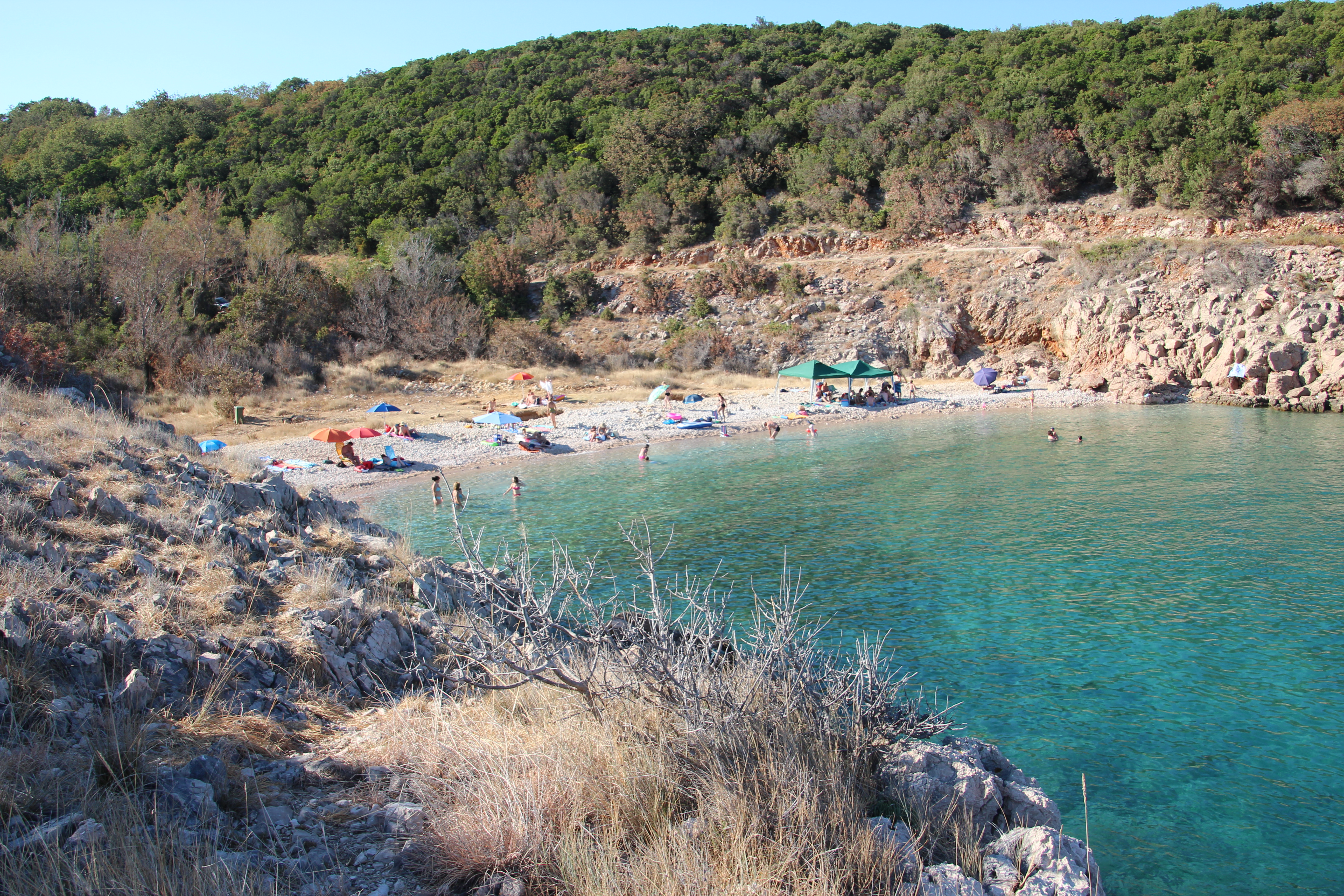 der Strand